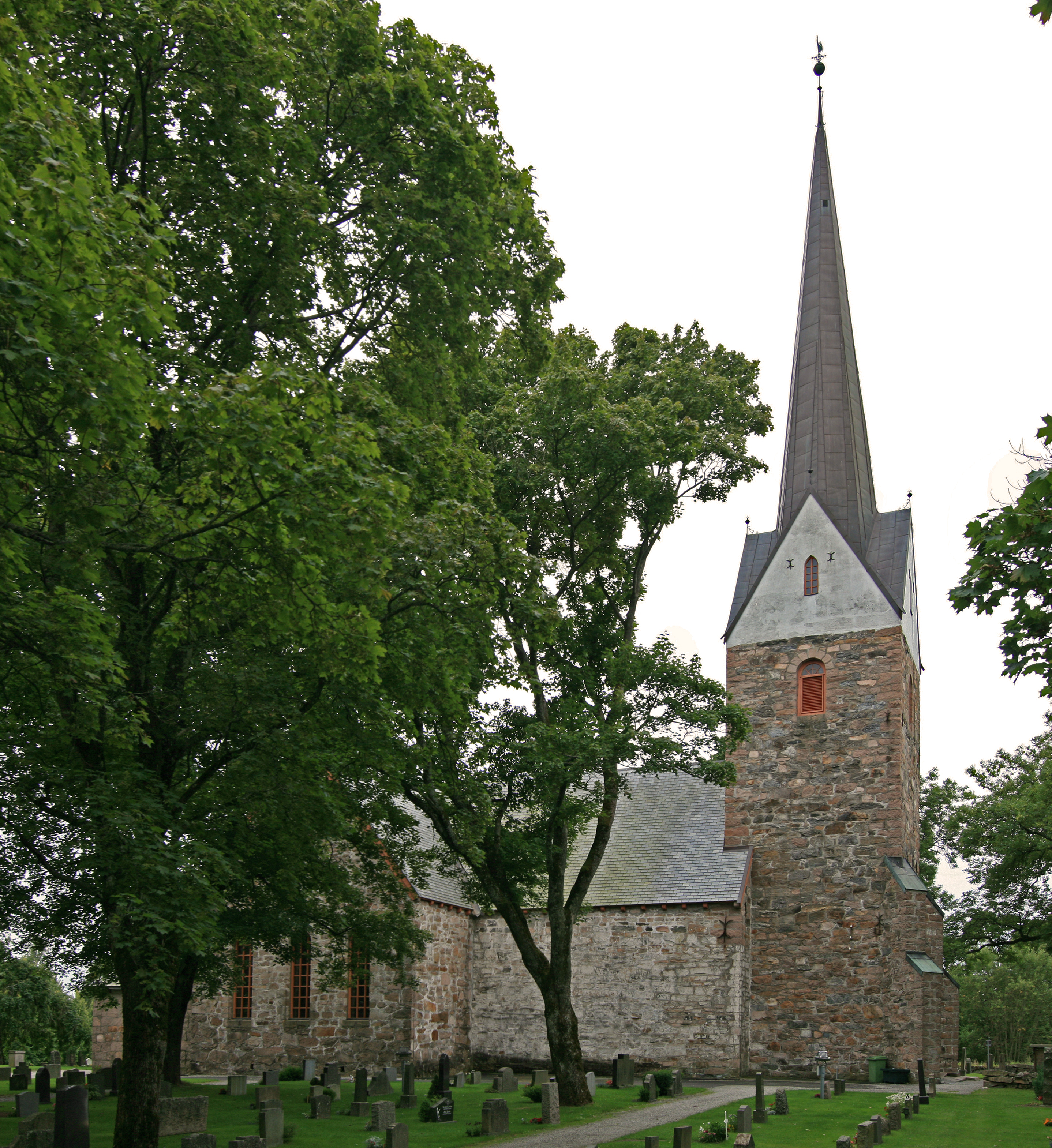 Skedsmo kirke